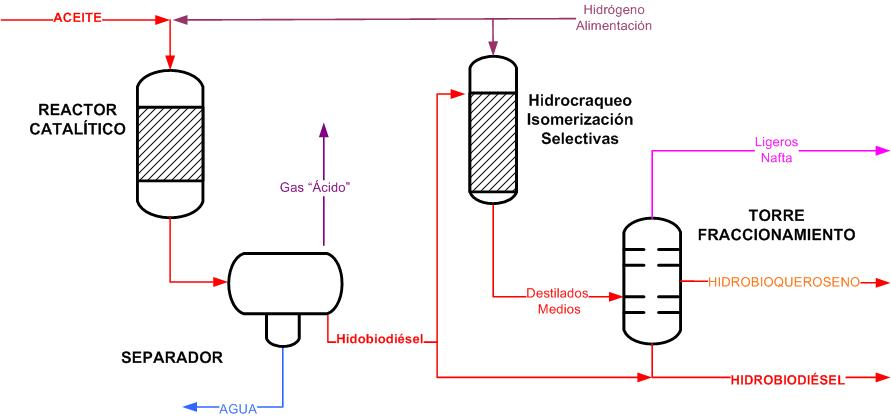 Este esquema se centra en la fabricación de bioqueroseno en unidades que procesan en exclusiva materia prima renovable.